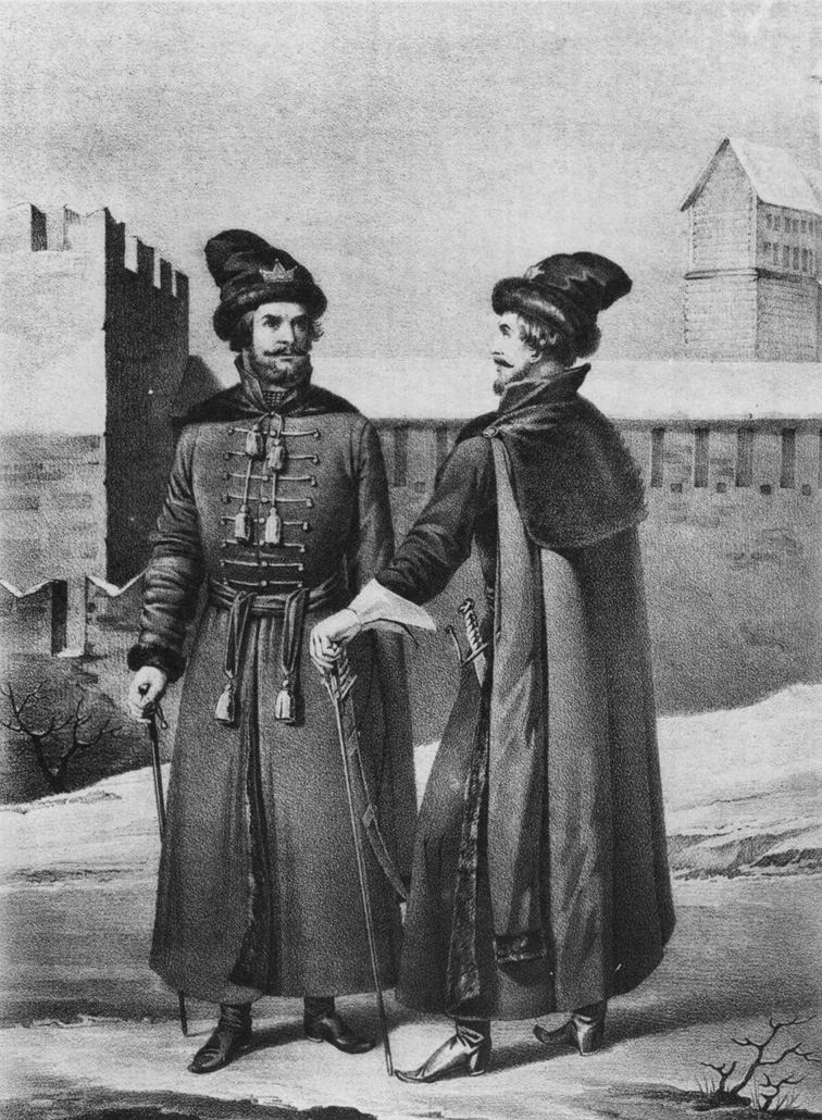 Начальные люди или офицеры Московских Стрелецких полков: в 1674 году.